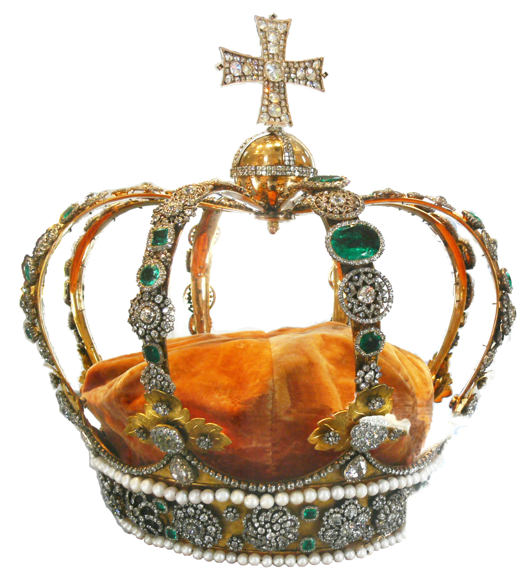 Württembergische Königskrone aus dem Kronschatz, Württembergisches Landesmuseum Stuttgart.